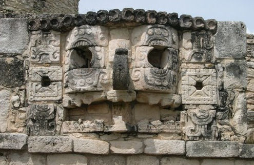 Máscara de Chaac en Mayapan. Macilaci - Sep 05